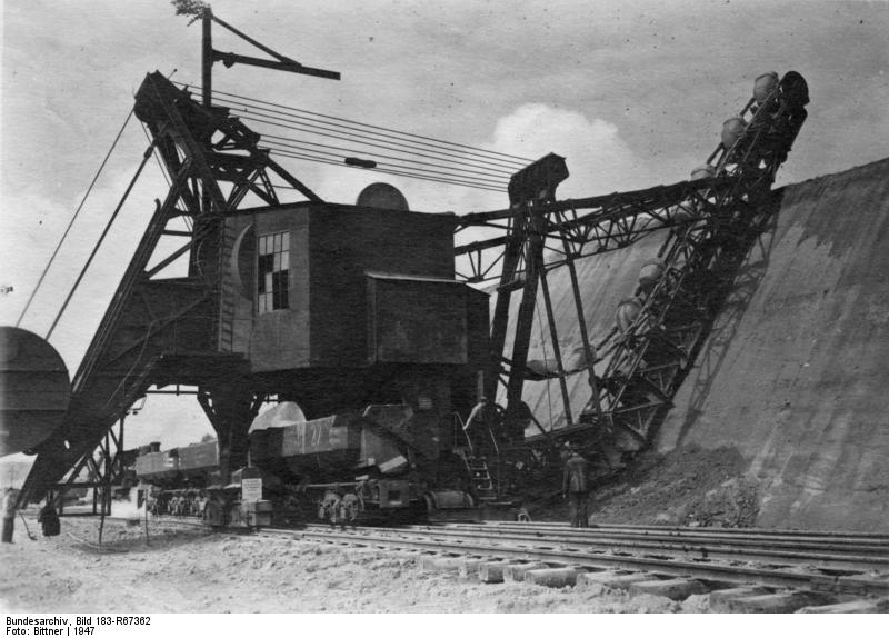 Mineralölwerk Lützkendorf, Abraumbagger Illus-Bittner Das größte Mineralöl-Werk der Ostzone. In harter Arbeit wurde das durch Kriegseinwirkungen geradezu verwüstete Erdöl- und Synthesewerk Lützkendorf in Krumpa (Sachsen-Anhalt) soweit wiederhergestellt, daß die für die Wirtschaft der Ostzone so wichtige Produktion wieder aufgenommen werden konnte. Außer Benzin- und Dieseltreibstoffen werden alle Sorten von Schmierölen - vom leichten Spindelöl bis zum hochwertigen Motoröl, vom höchst raffinierten Turbinenöl bis zum schwersten Zylinderöl - hier erzeugt. In naher Zukunft wird hier auch der zweite große Werkteil wieder hergestellt sein, aus dem der Ostzone u.a. wertvollste Grundstoffe für die Fabrikation von Waschmitteln zufließen werden. U.B.z.: Das Schmieröl- und Treibstoffwerk in Lützkendorf. Abraumbagger in der werkseigenen Grube bei der Arbeit. 837-47